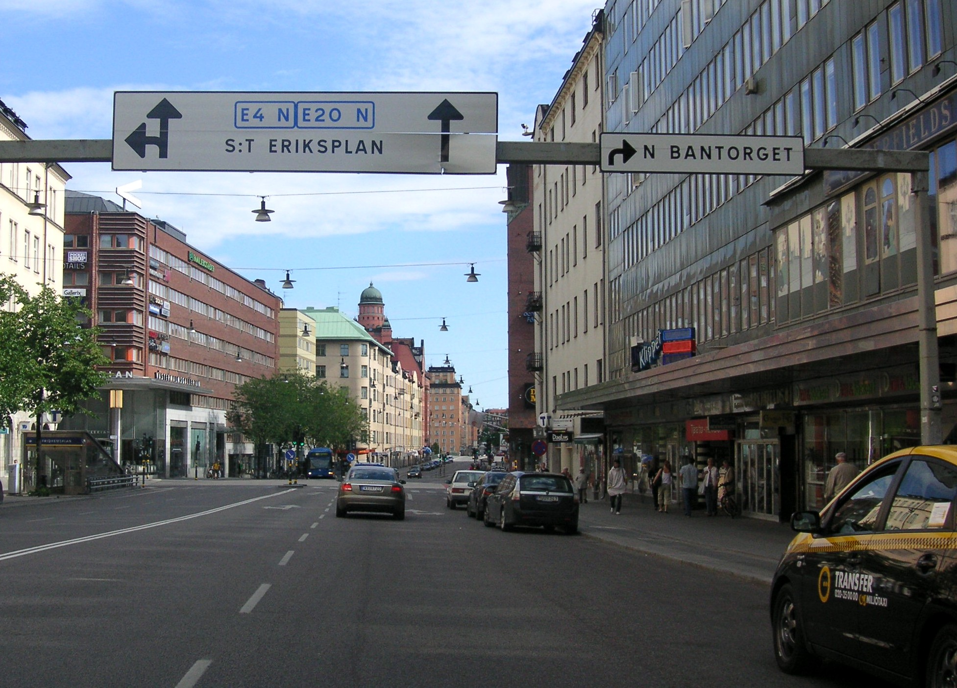 S:t Eriksgatan i Stockholm